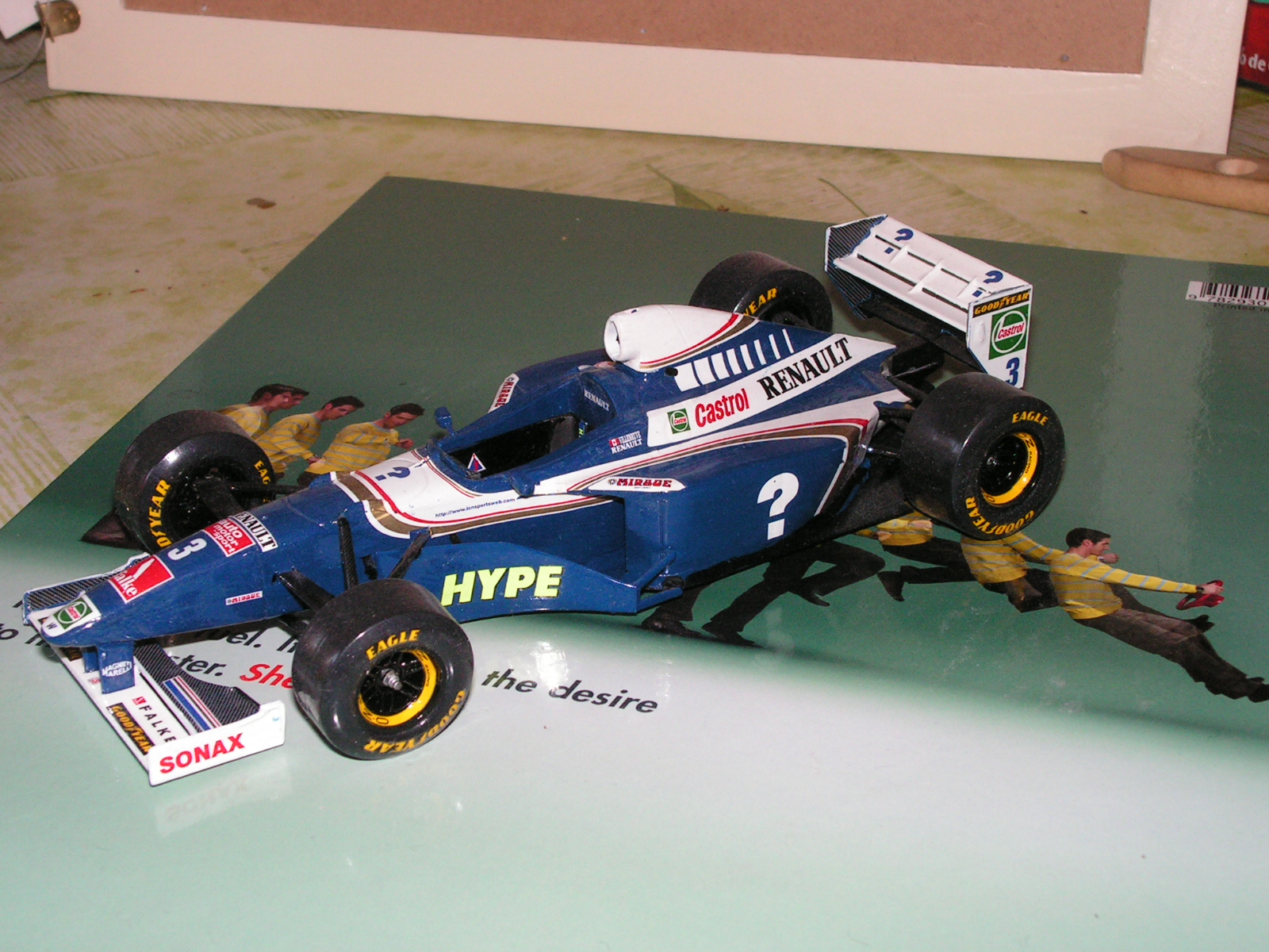 maquette revell Williams FW19